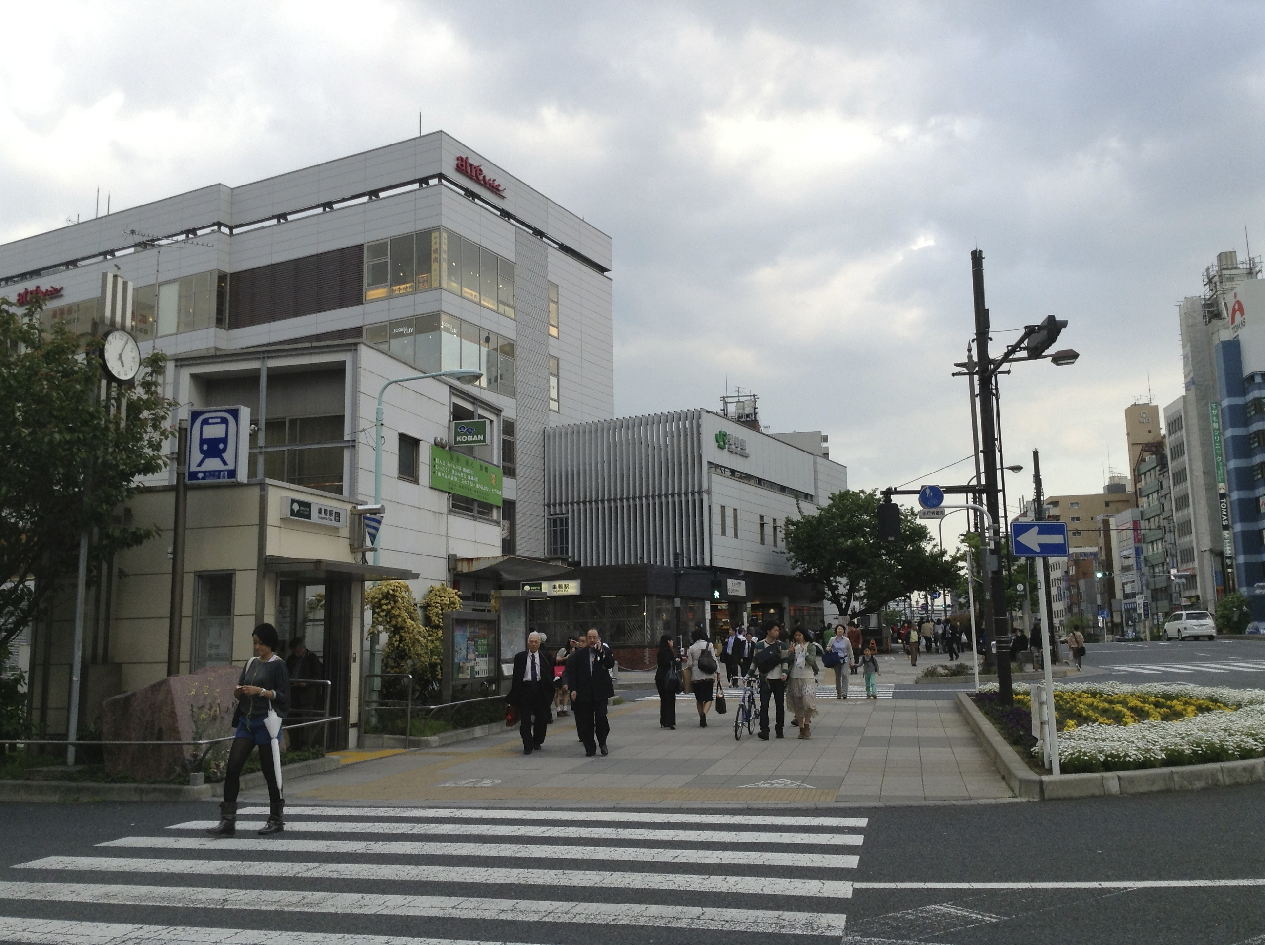 巣鴨駅正面口前